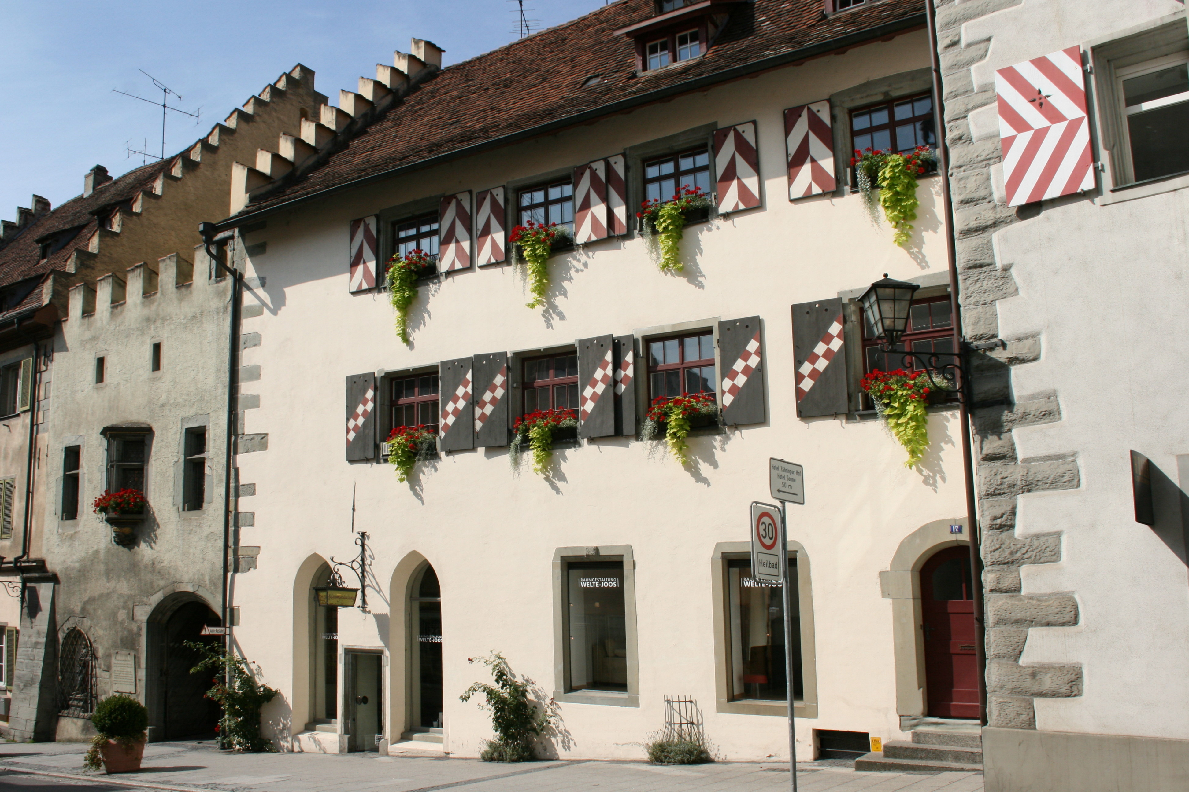 Franziskanerstraße in Überlingen